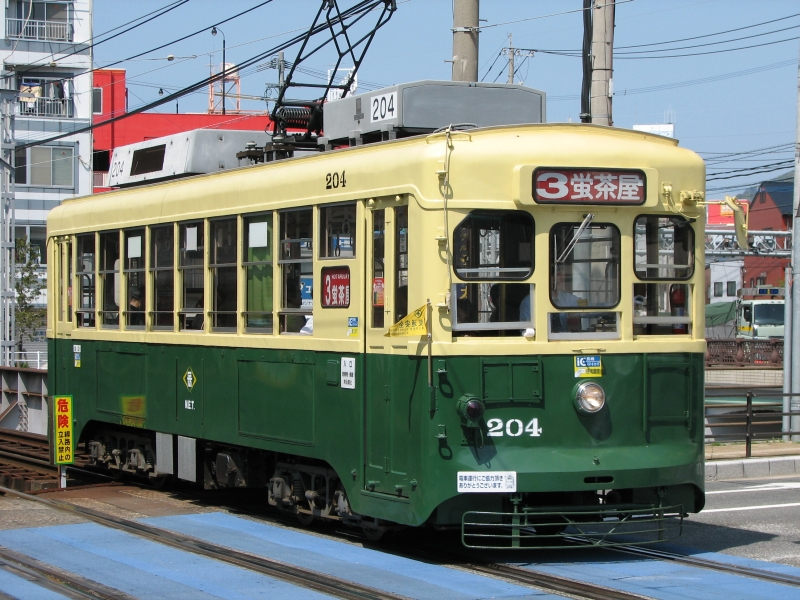 Tramm 204 Nagasaki kesklinnas